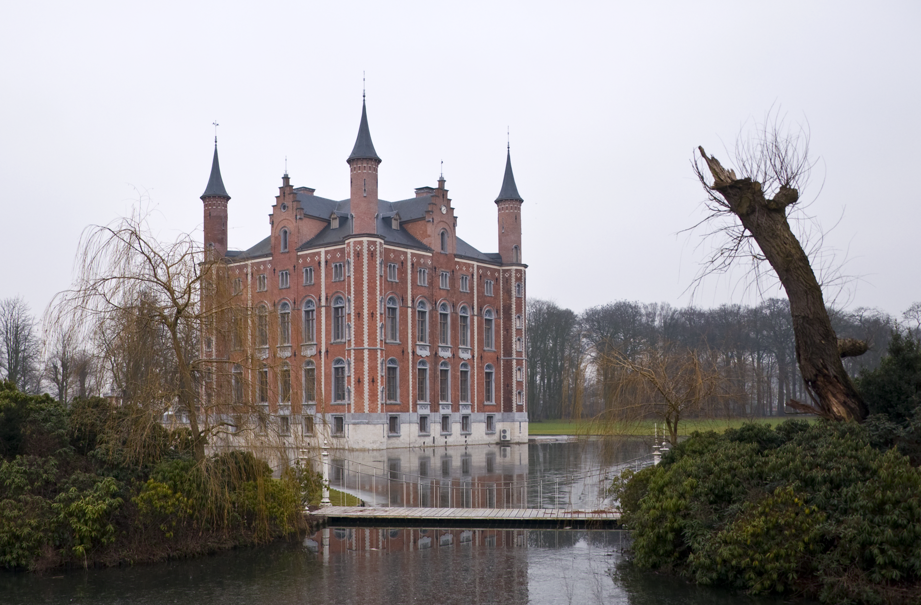 Kasteel van Olsene, België